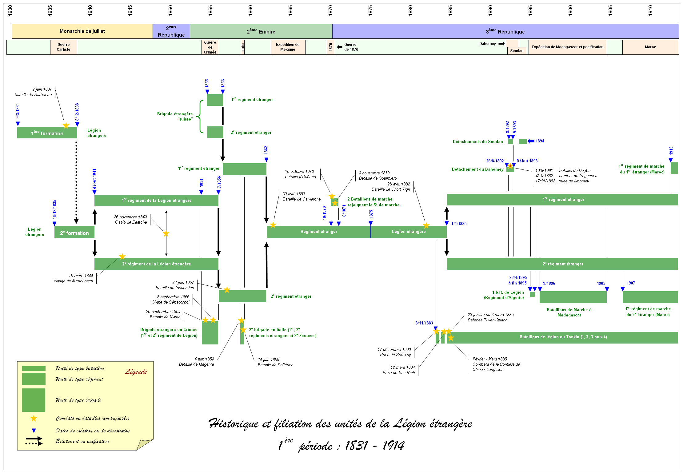 Diagramme présentant l'historique et la filiation des unités de légion entre 1931 et 1913 (inclus). Les informations sont extraites de différents livres principalement de l'ouvrage Le livre d'or de la Légion 1831-1955,(Brunon et Manue), Ed Charles Lavauzelle, 1958.